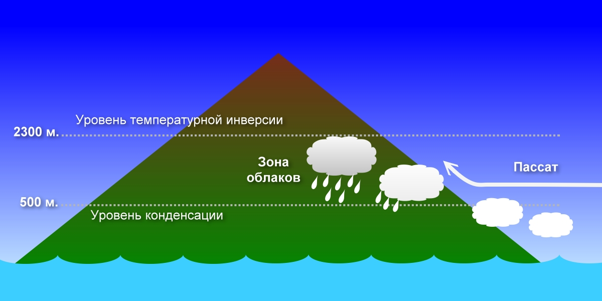 Климат острова Гавайи. Иллюcтрация для викиуебника Гавайеведение